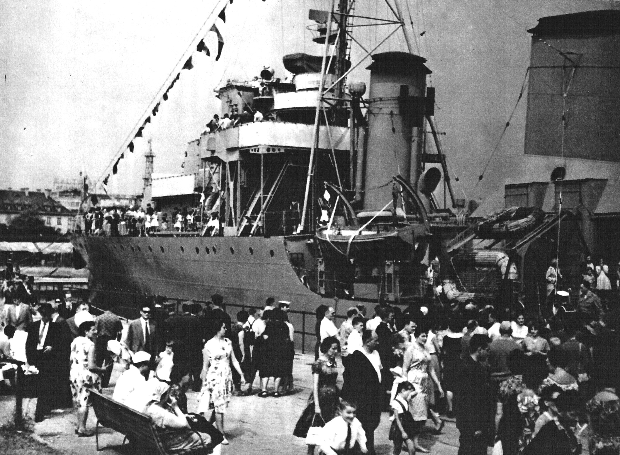 Niszczyciel ORP "Burza" jako okręt-muzeum